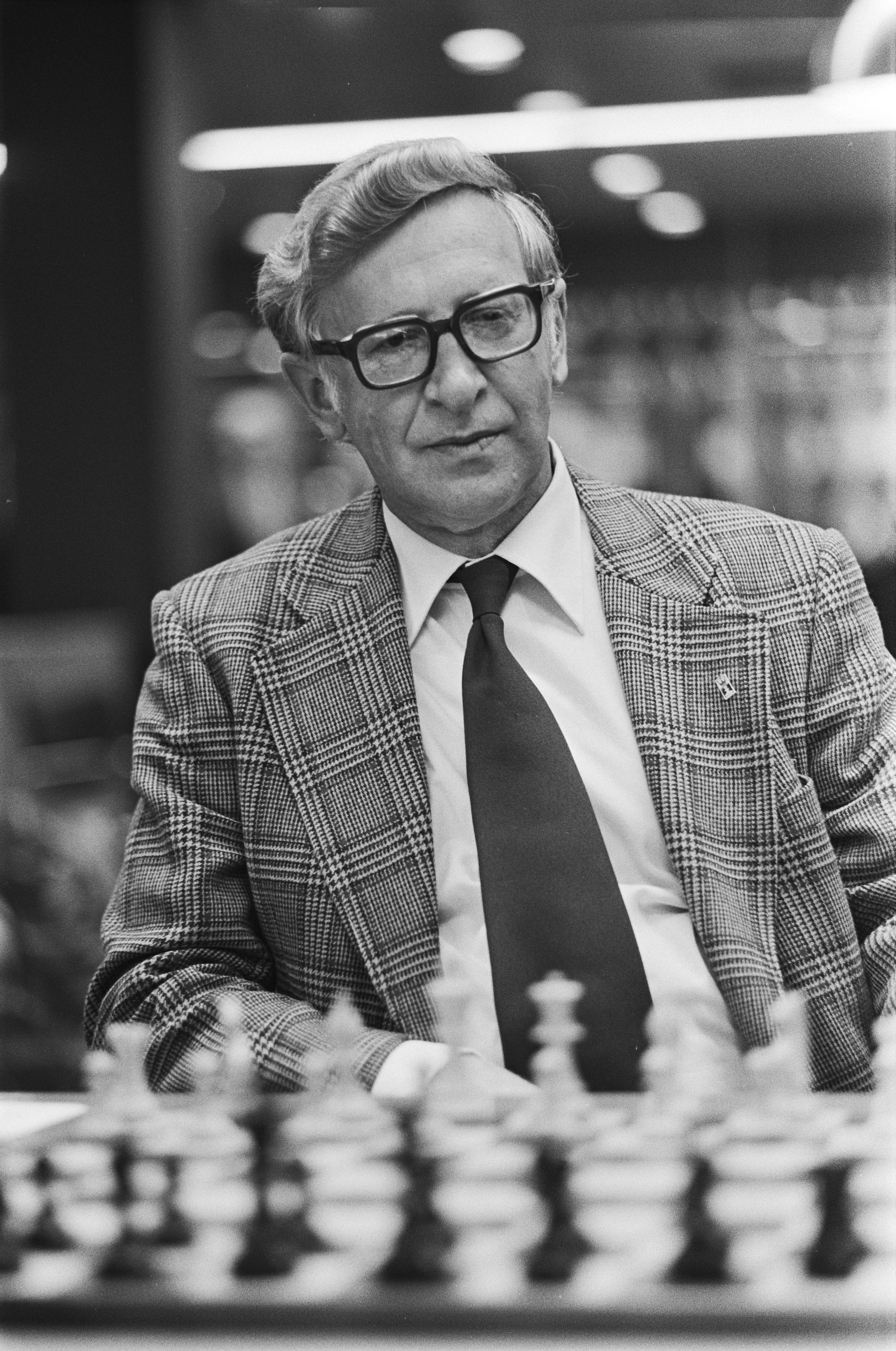 Collectie / Archief : Fotocollectie Anefo Reportage / Serie : [ onbekend ] Beschrijving : Interpolisschaaktoernooi Tilburg; 18/19 Smyslov aan zet Datum : 24 september 1977 Locatie : Noord-Brabant, Tilburg Trefwoorden : schaken Persoonsnaam : Interpolisschaaktoernooi Fotograaf : Suyk, Koen / Anefo Auteursrechthebbende : Nationaal Archief Materiaalsoort : Negatief (zwart/wit) Nummer archiefinventaris : bekijk toegang 2.24.01.05 Bestanddeelnummer : 929-3630